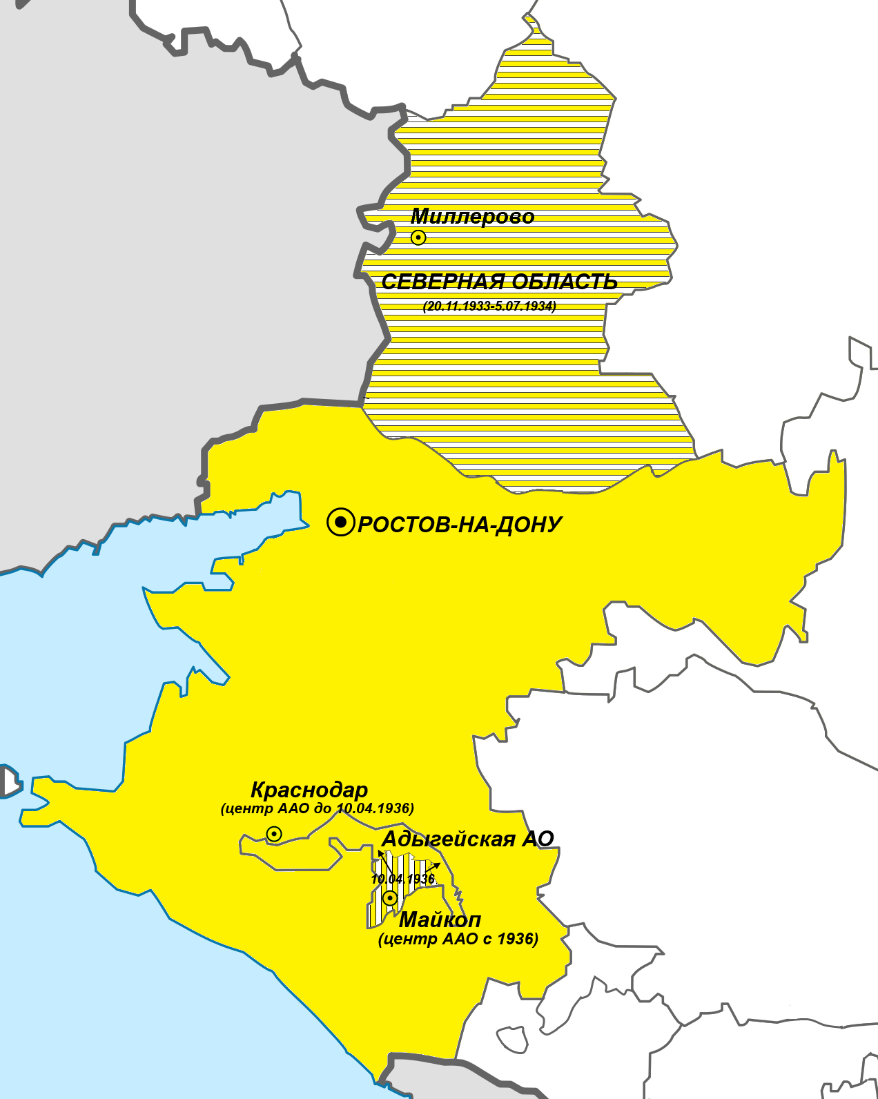 Азово-Черноморский край (1934-1937)